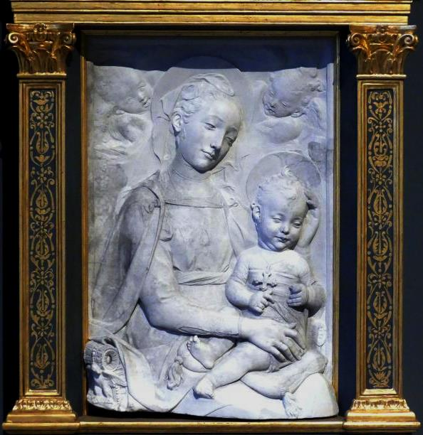 Ausstellungsansicht Madonna mit Kind und zwei Putten. Bode Museum 2015